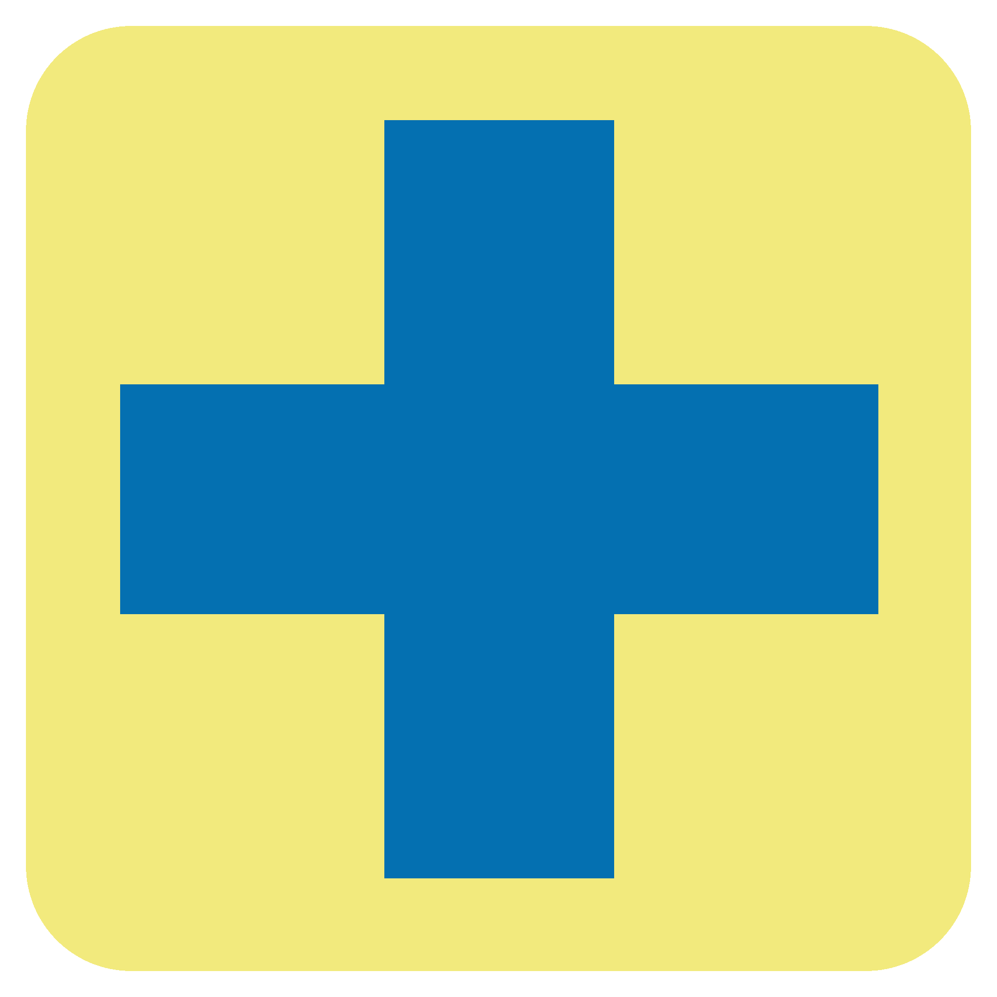 Símbolo utilizado para identificar a la estación Hospital en 2001.